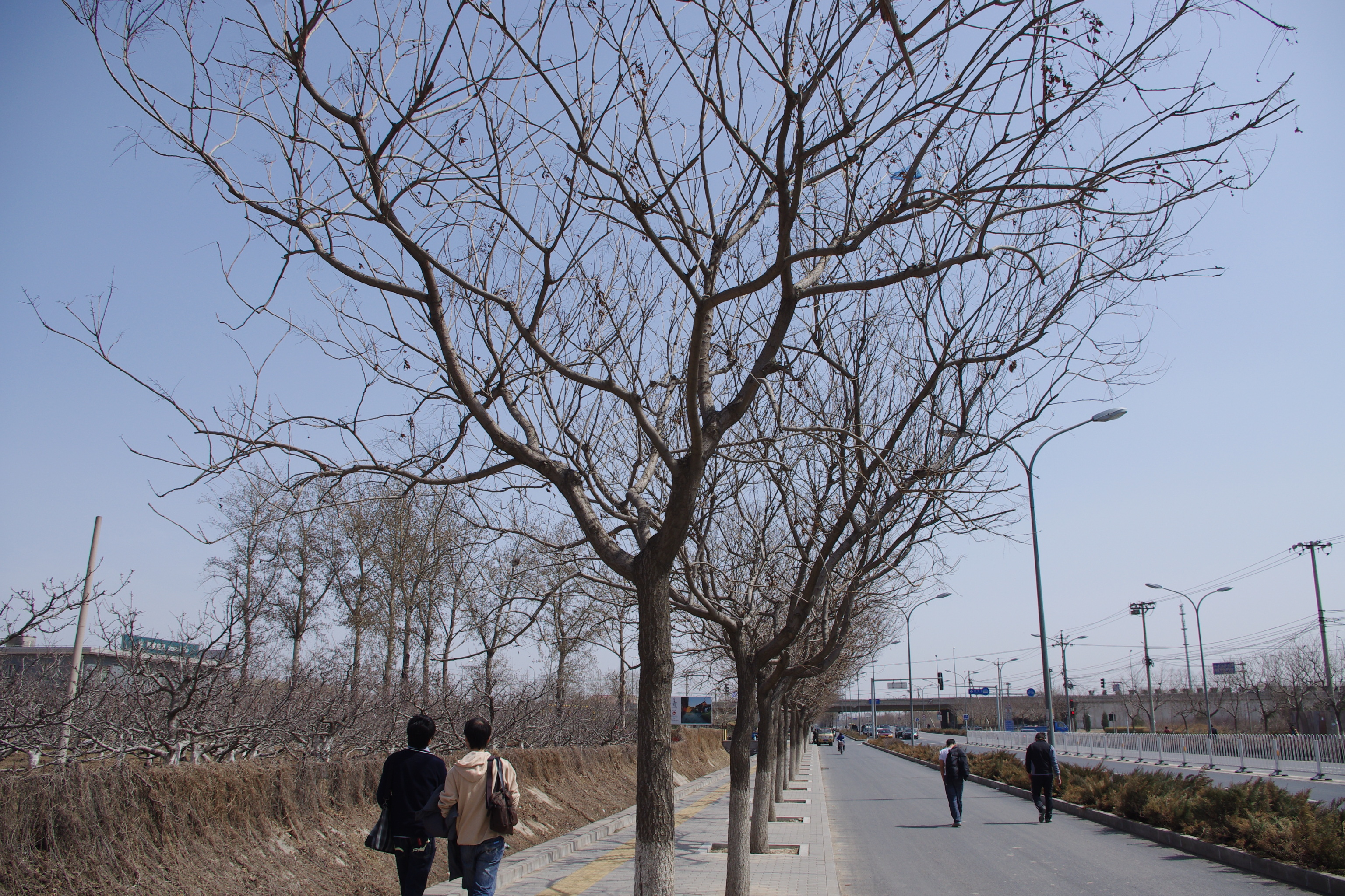 北京 門頭村